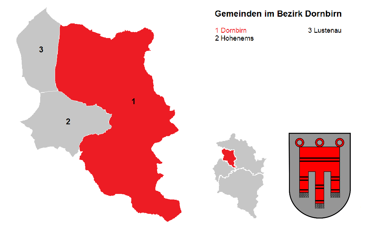 Bezirk Dornbirn